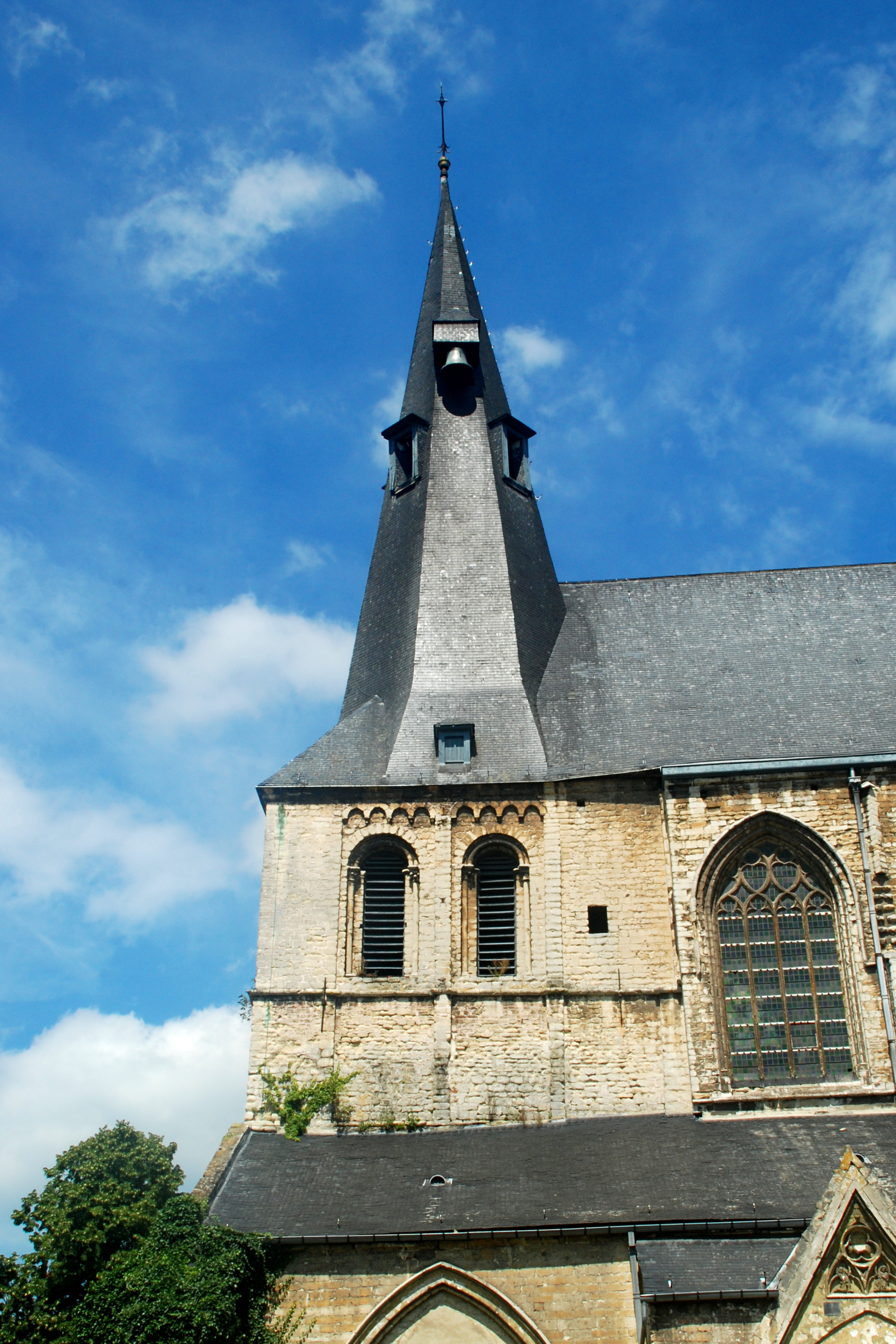 Belgique - Brabant flamand - Louvain (Leuven) - Église Saint-Jacques (Sint-Jacobskerk)